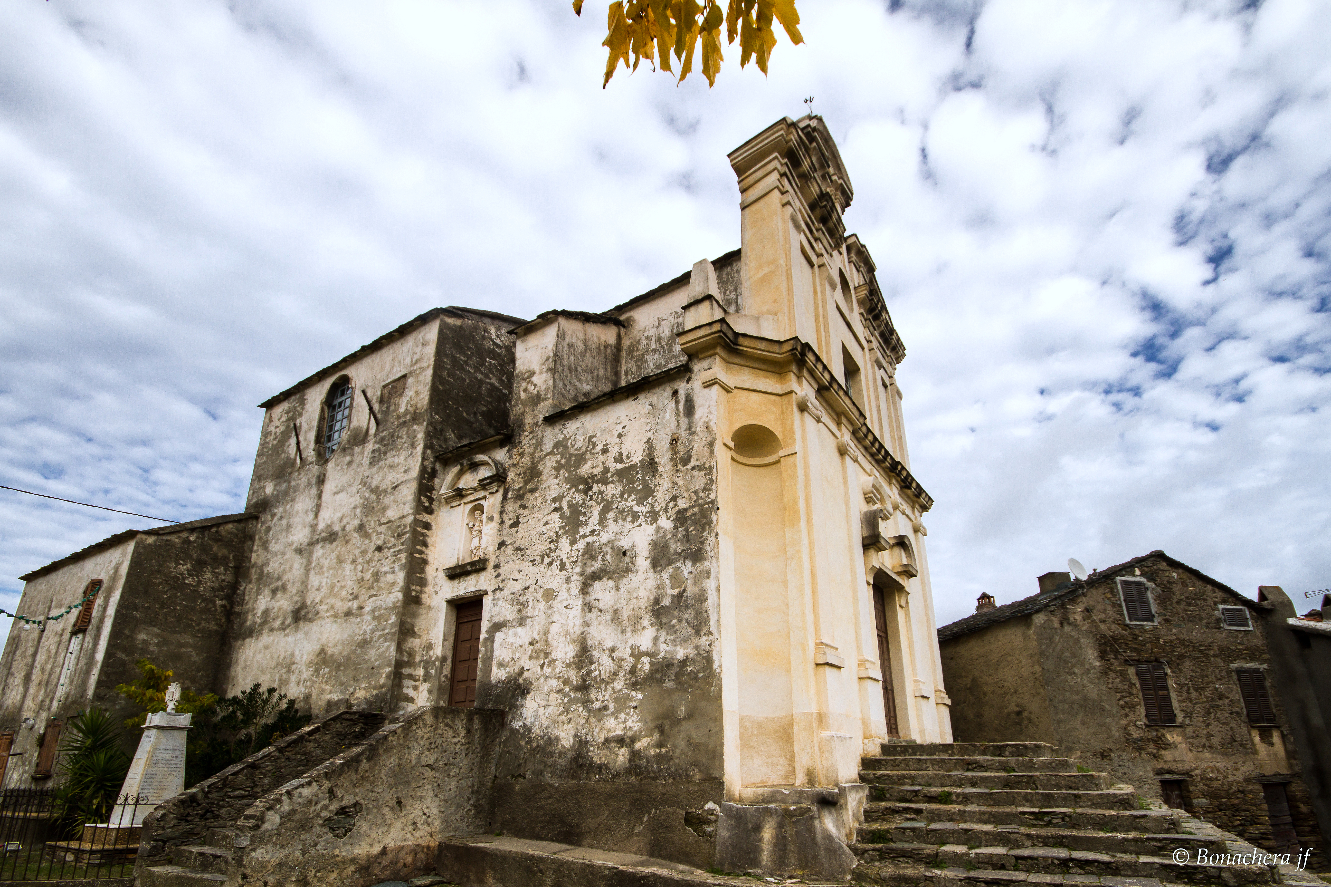 Novale, Castagniccia (Haute-Corse) - L'église paroissiale Saint-Etienne